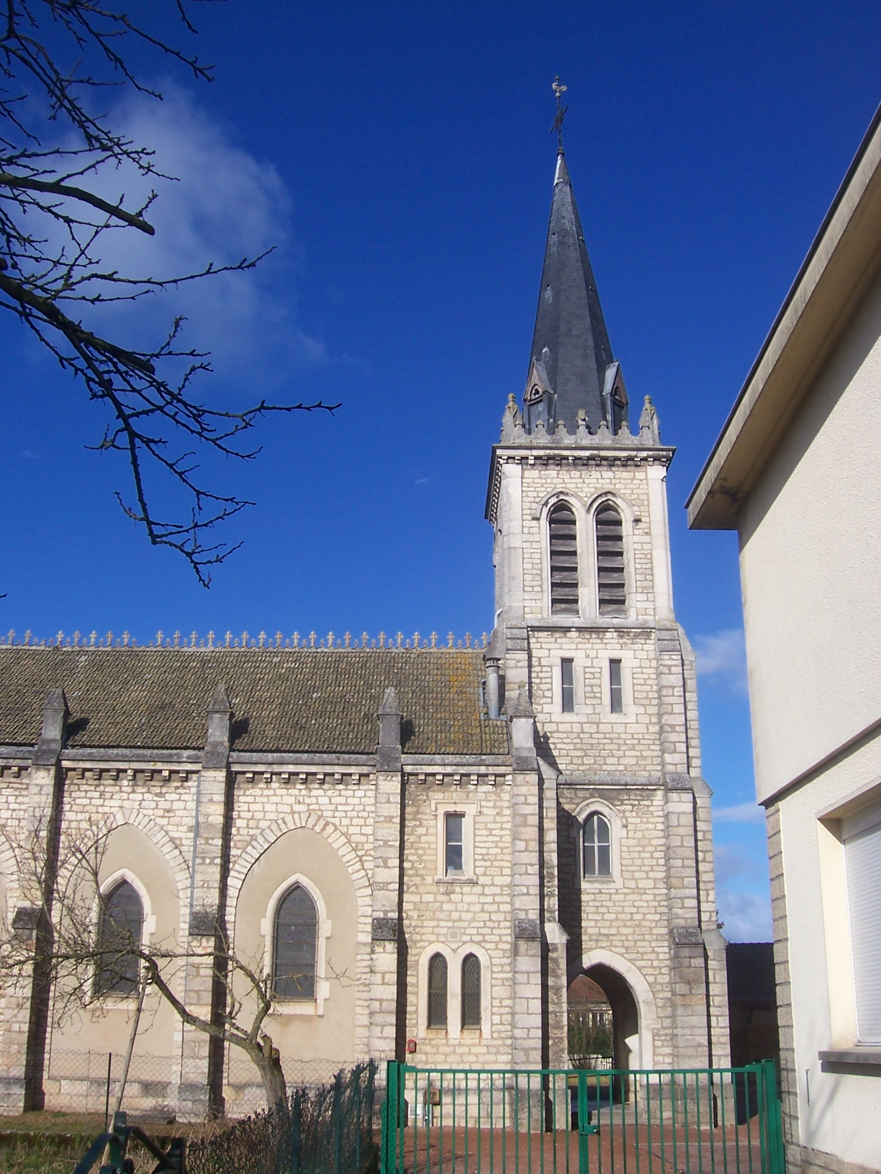 Lux Eglise